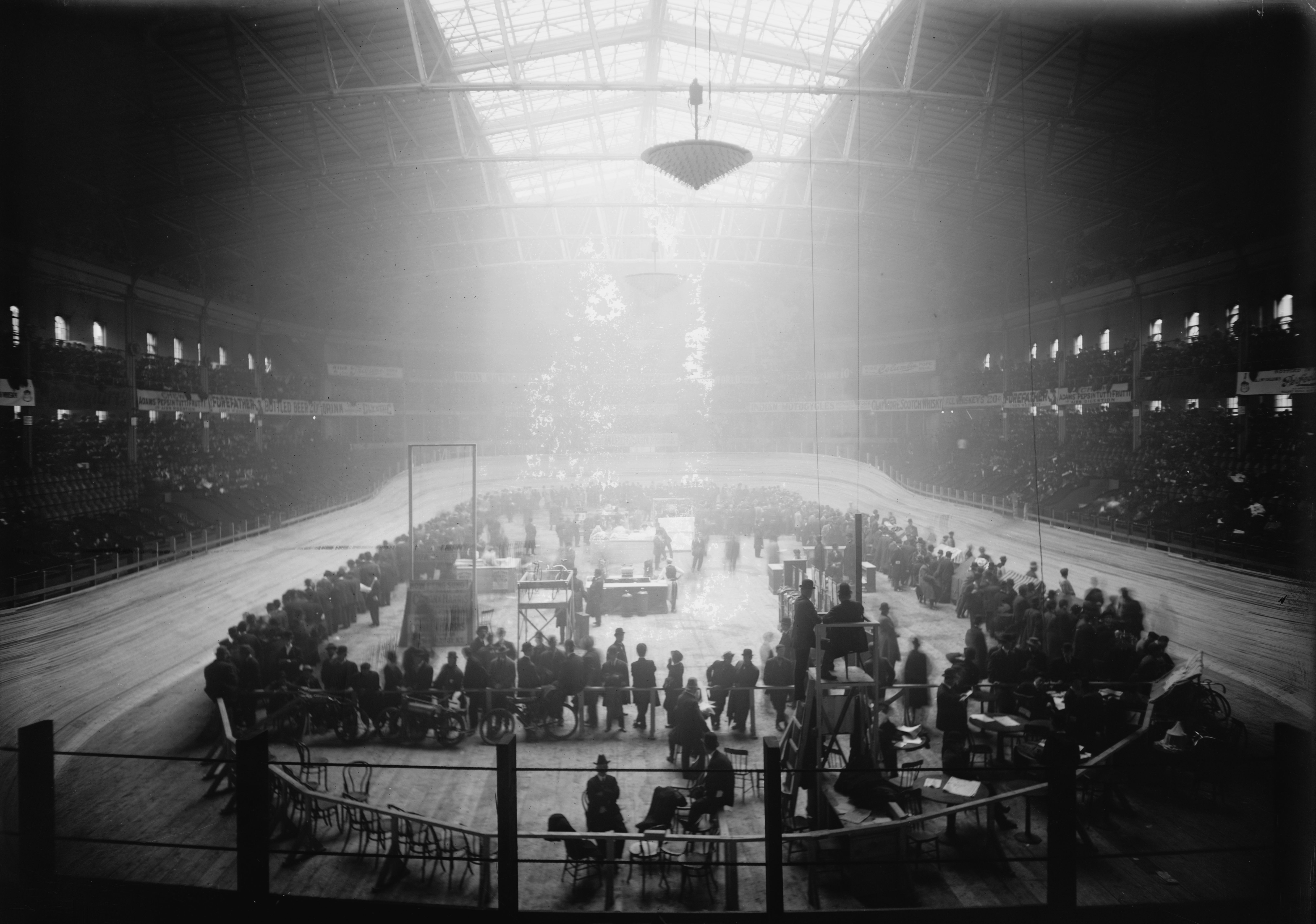 Six jours de New-York, Madison Square Garden